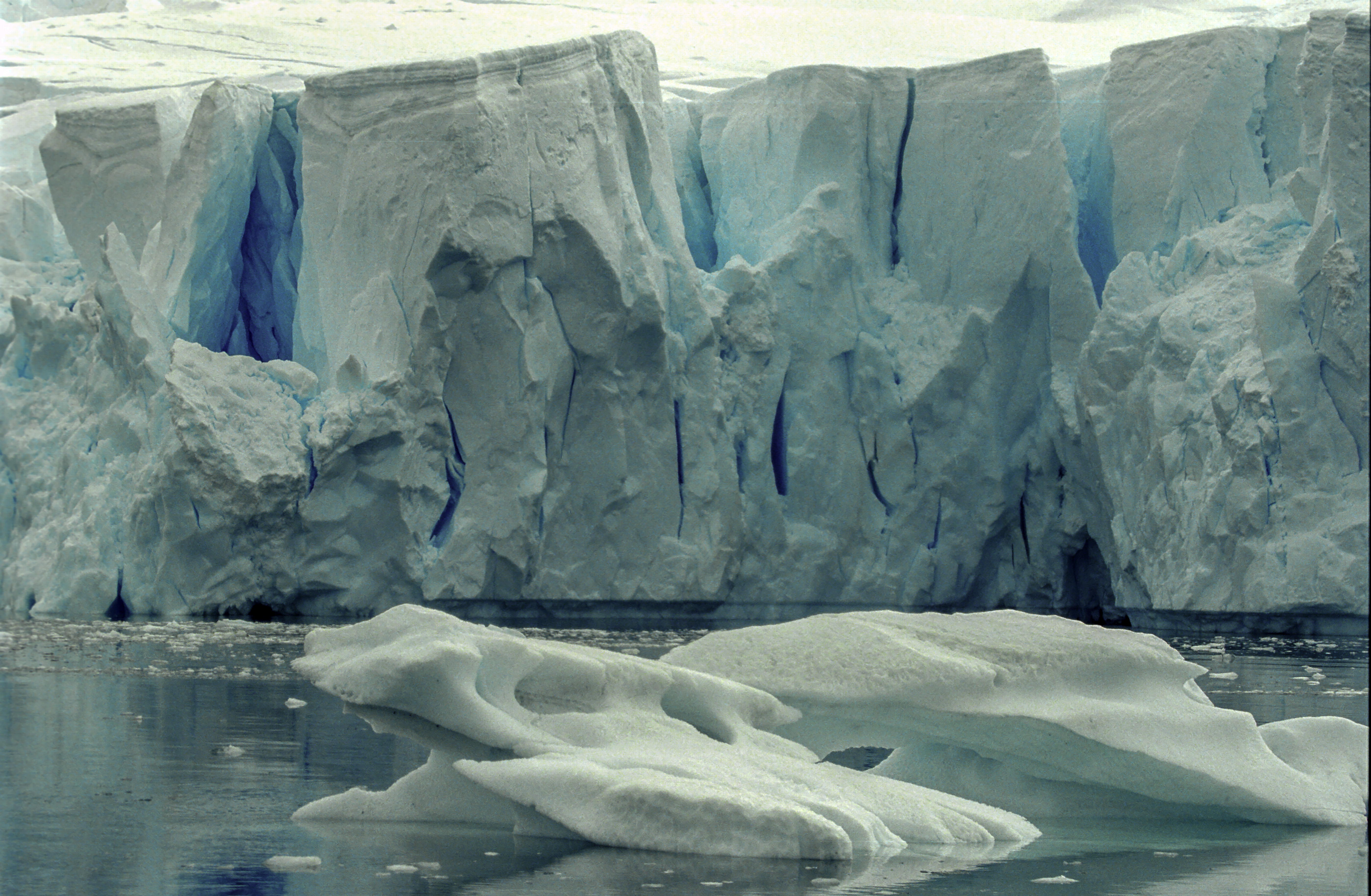 Glacier in Neko Harbour